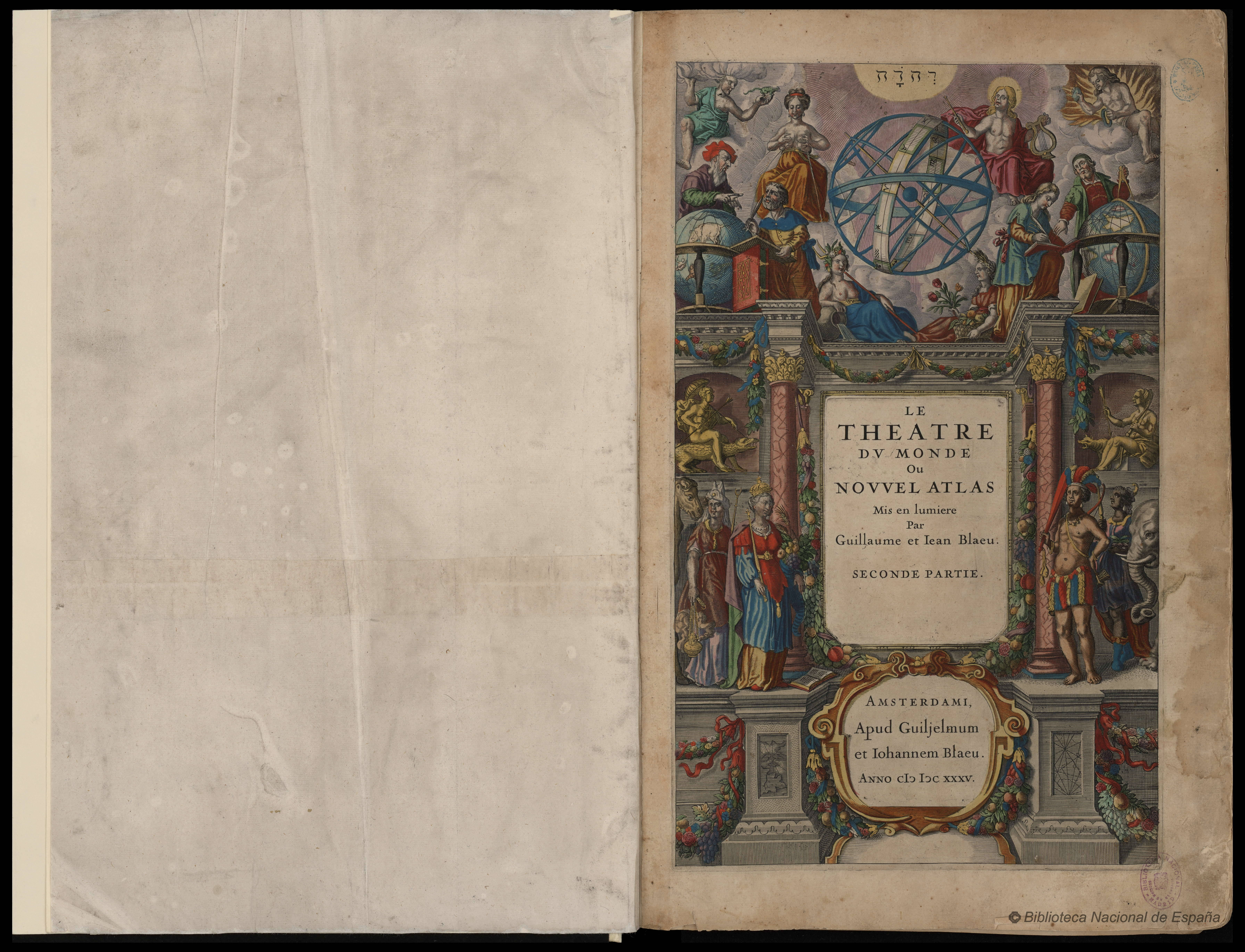 Ingekleurd titelblad van het Theatre du Monde; Seconde Partie